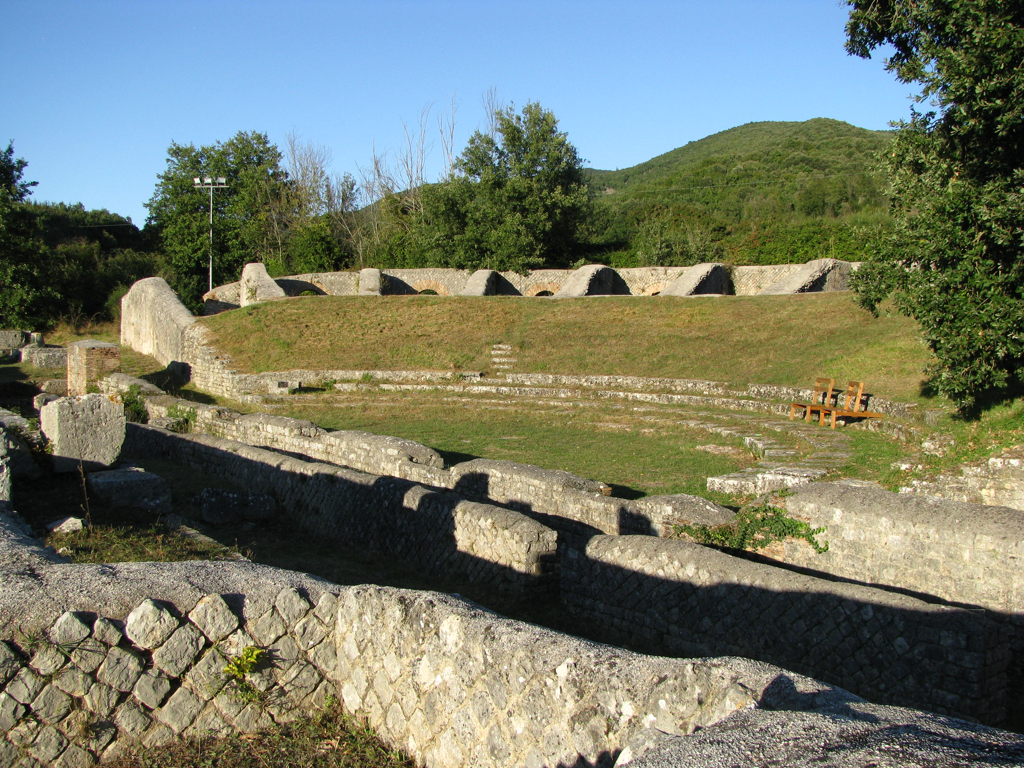 Area Archeologica di Carsulae - MIBAC This is a photo of a monument which is part of cultural heritage of Italy.